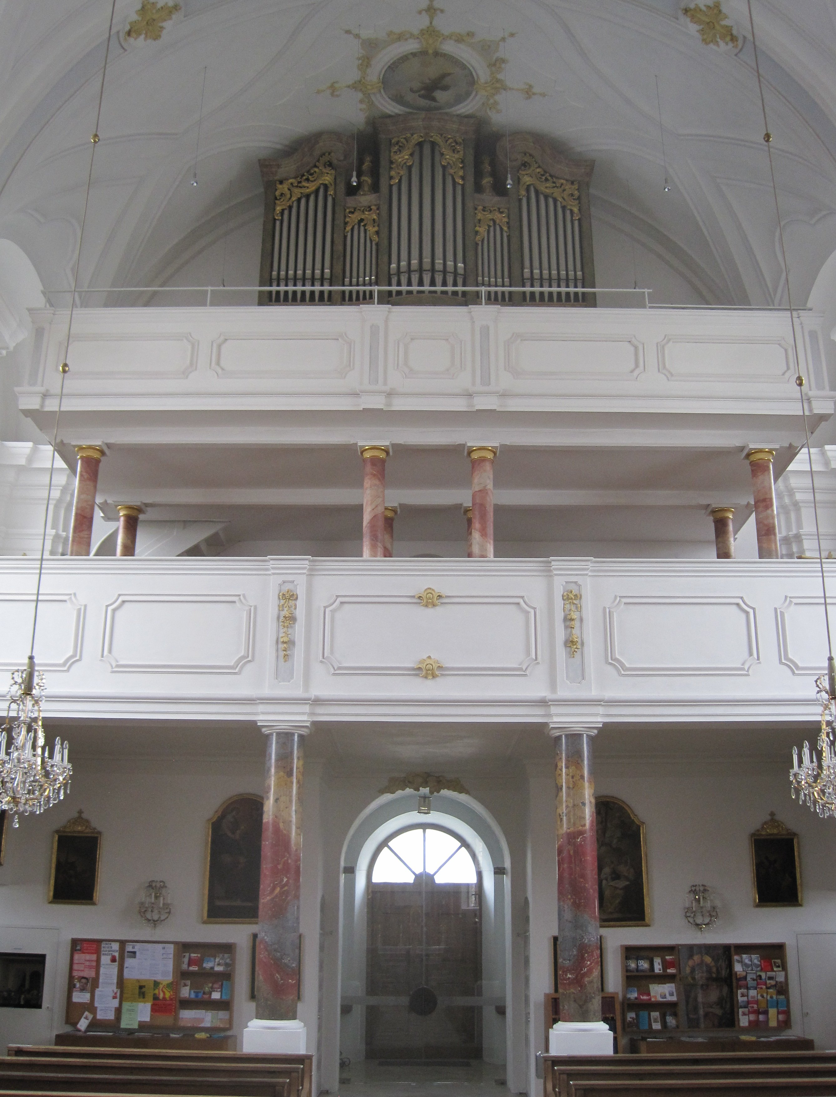 Blick auf die Orgelempore von St. Michael in München-Perlach